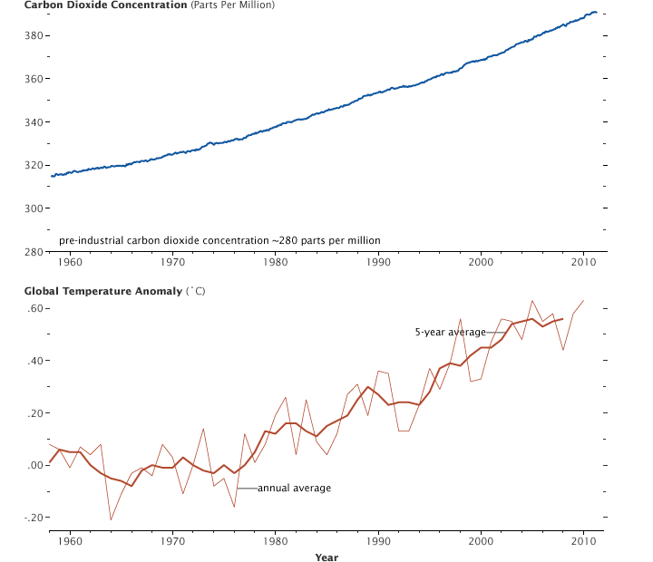 Концентрација на јаглерод диоксид во периодот од 1960та година и негово влијание врз глобалното затоплување.